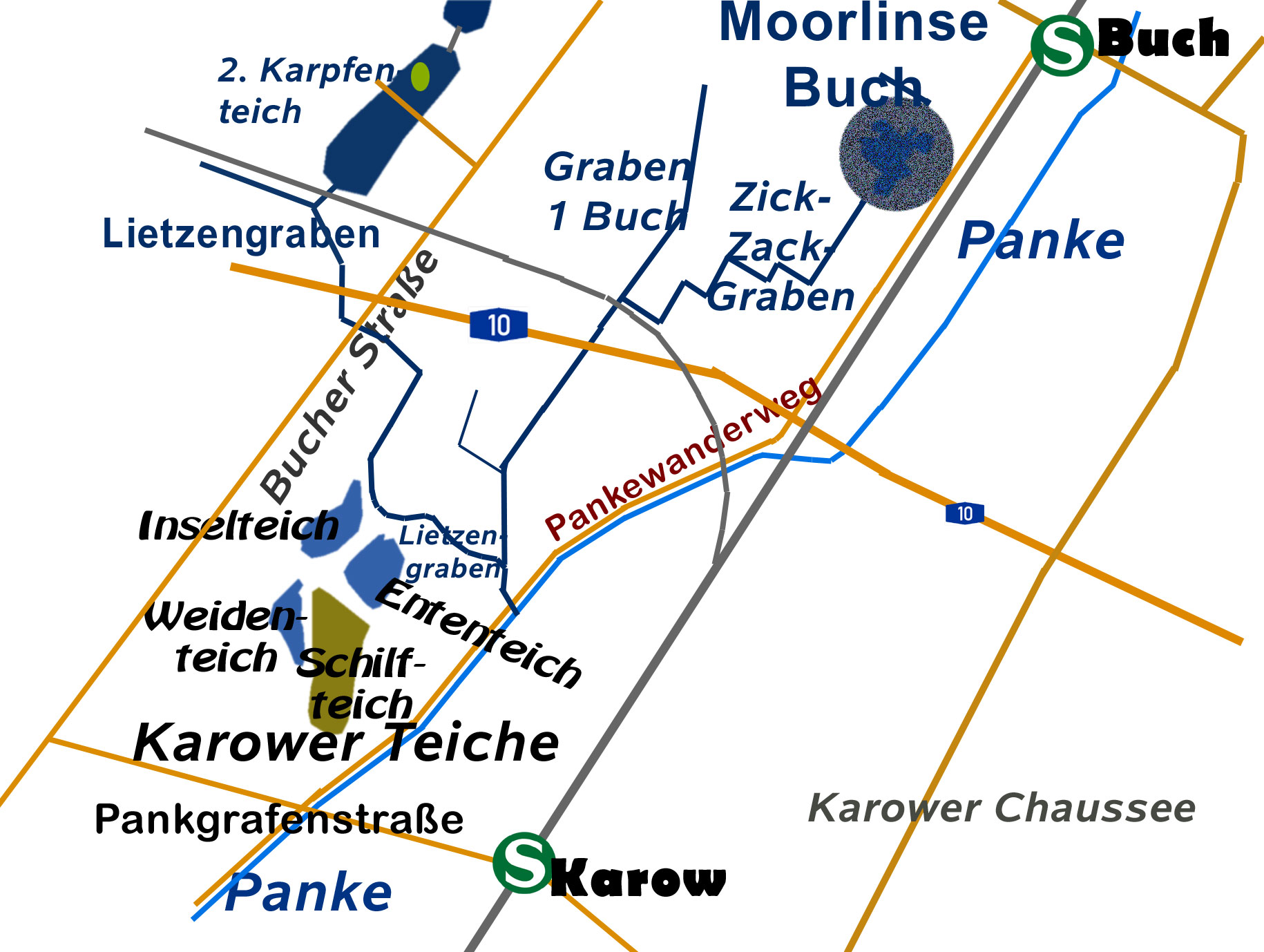 Die Umgebung und die Lage der Moorlinse Buch. Am Rande des Pankewanderweges gelegen. Dazu der Abfluss über den Zick-Zack-Graben und den Graben 1 Buch in den Lietzengraben und letztlich in die Panke. Dazu sind die Lage der Karower Teiche und des 1. und 2. Karpfenteiches im Naturschutzgebiet angegeben. Als eine Übersichtskarte unter Verwendung von Daten und Angaben aus FIS-broker, Hoogle earth und dem Berliner Stadtplan